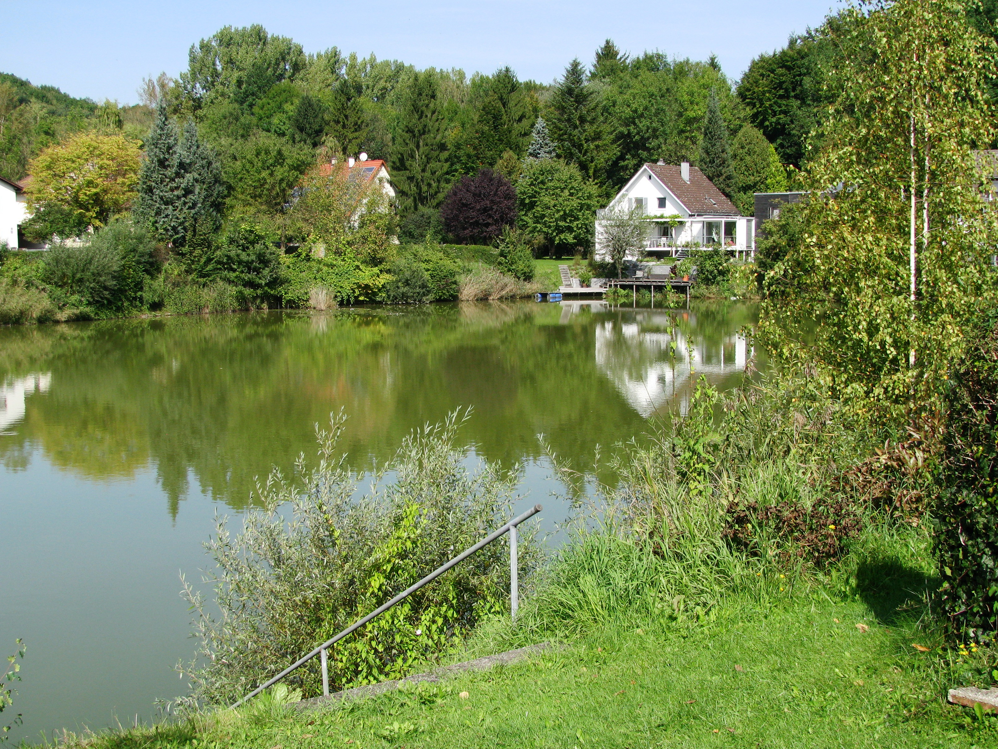 See in der Auensiedlung